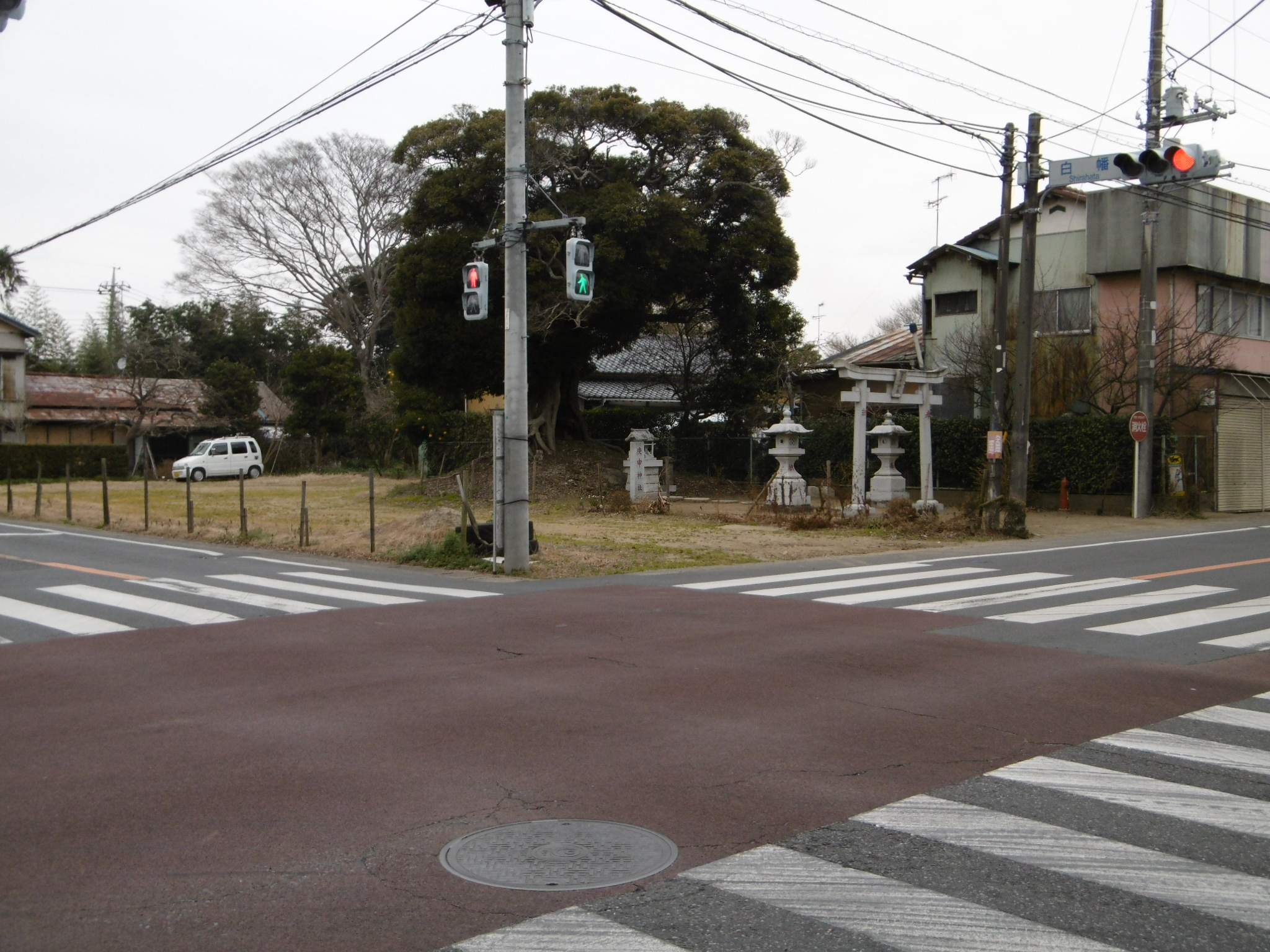 千葉県山武市白幡を通る千葉県道121号成東鳴浜線(左奥方)と千葉県道124号緑海東金線(右奥方)が白幡交差点で接続する。